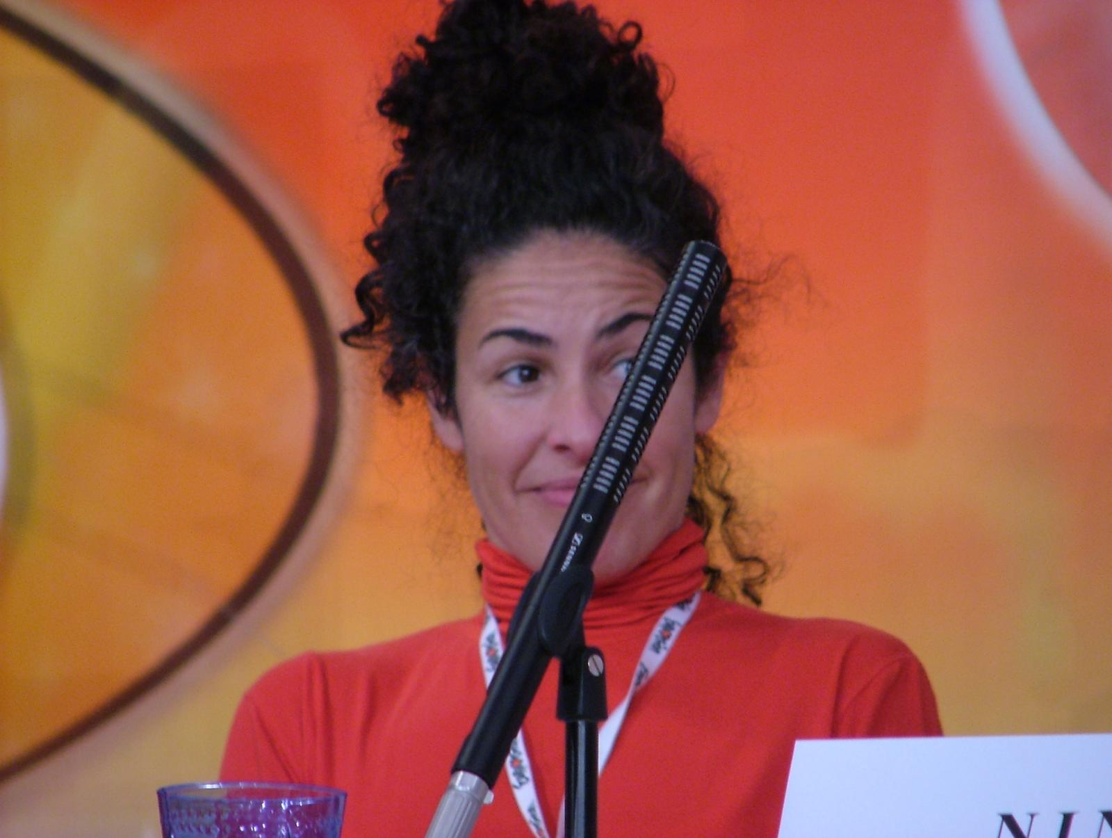 Nina amb el pentinat de la Marge Simpson